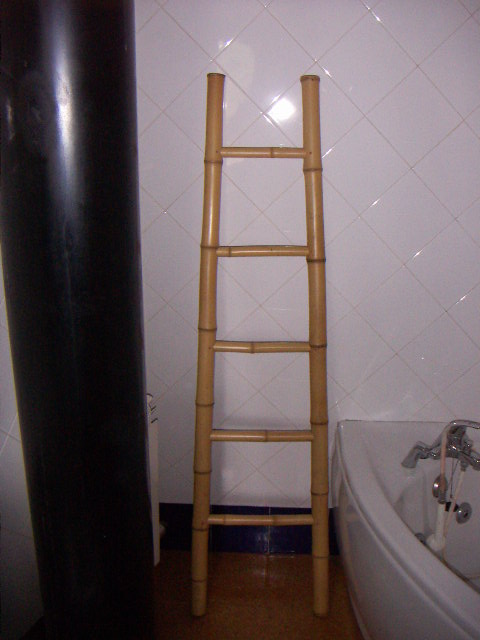 Escala de bambú Jordi Coll Costa 17:35, 17 May 2005 (UTC)